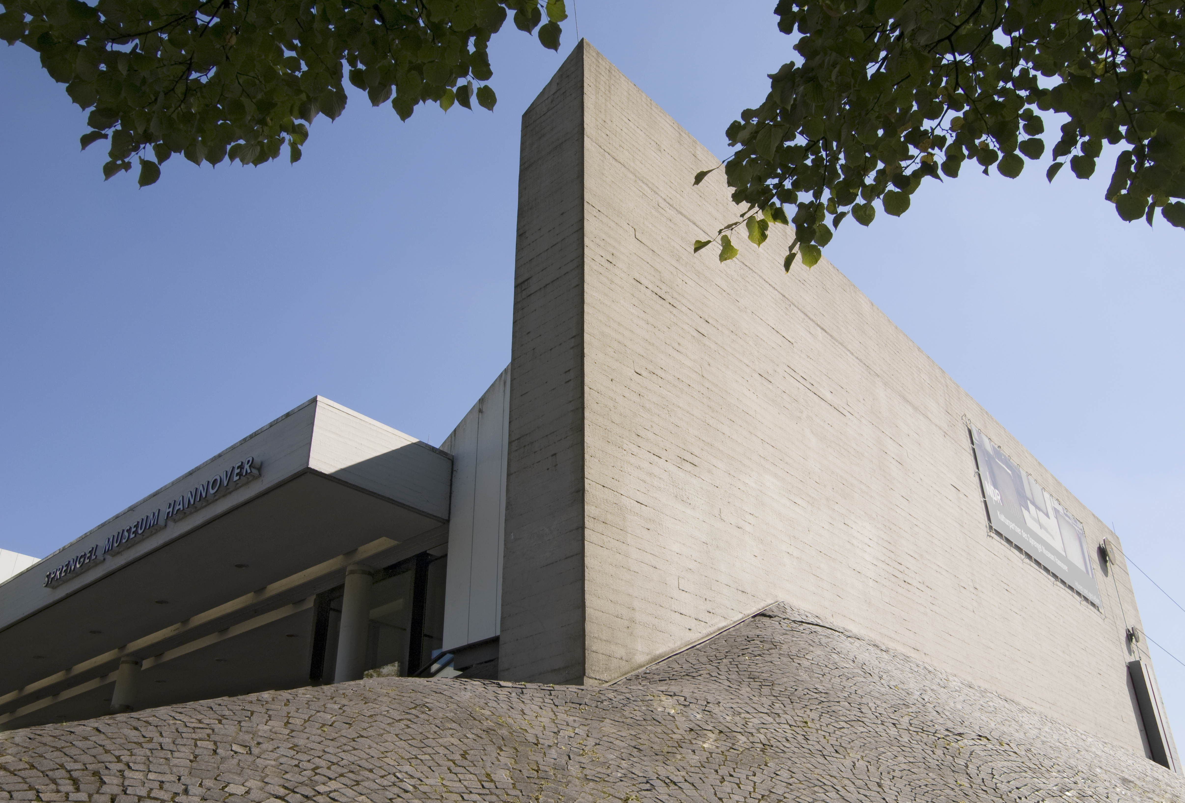 Sprengel Museum Hannover